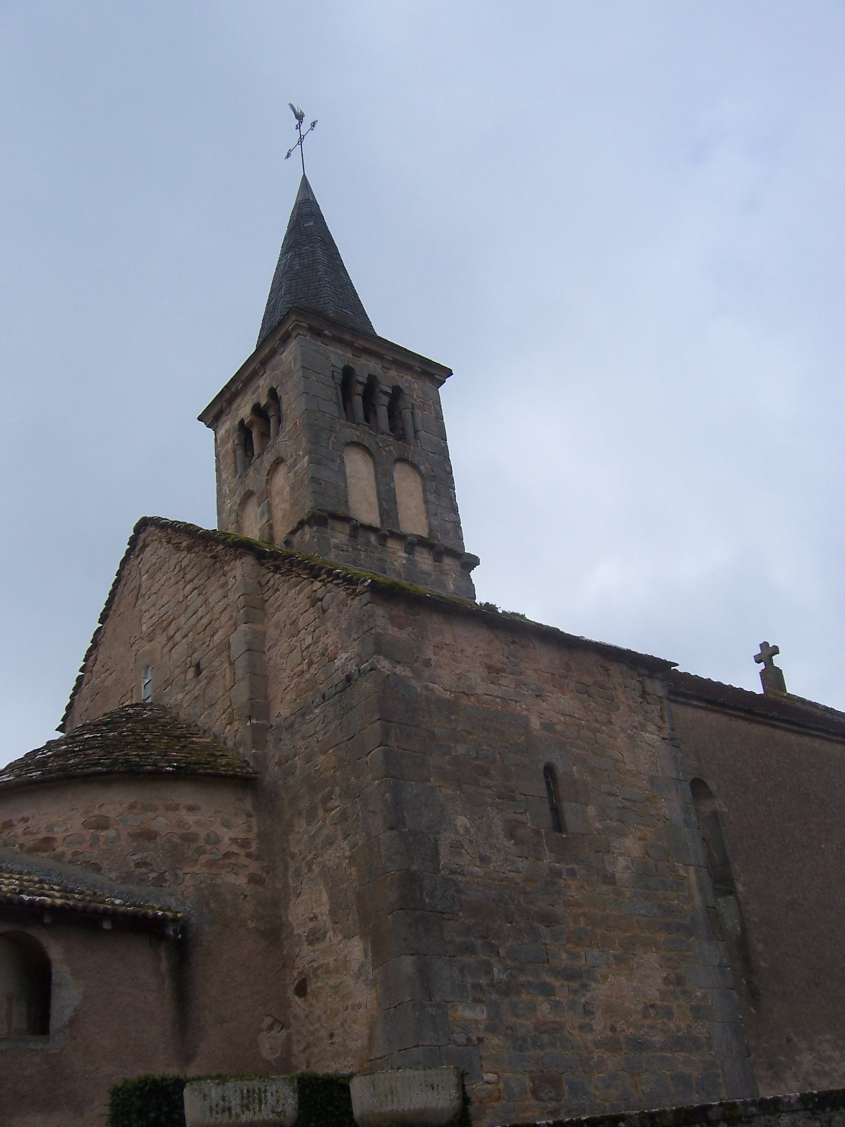 Eglise de Chiddes